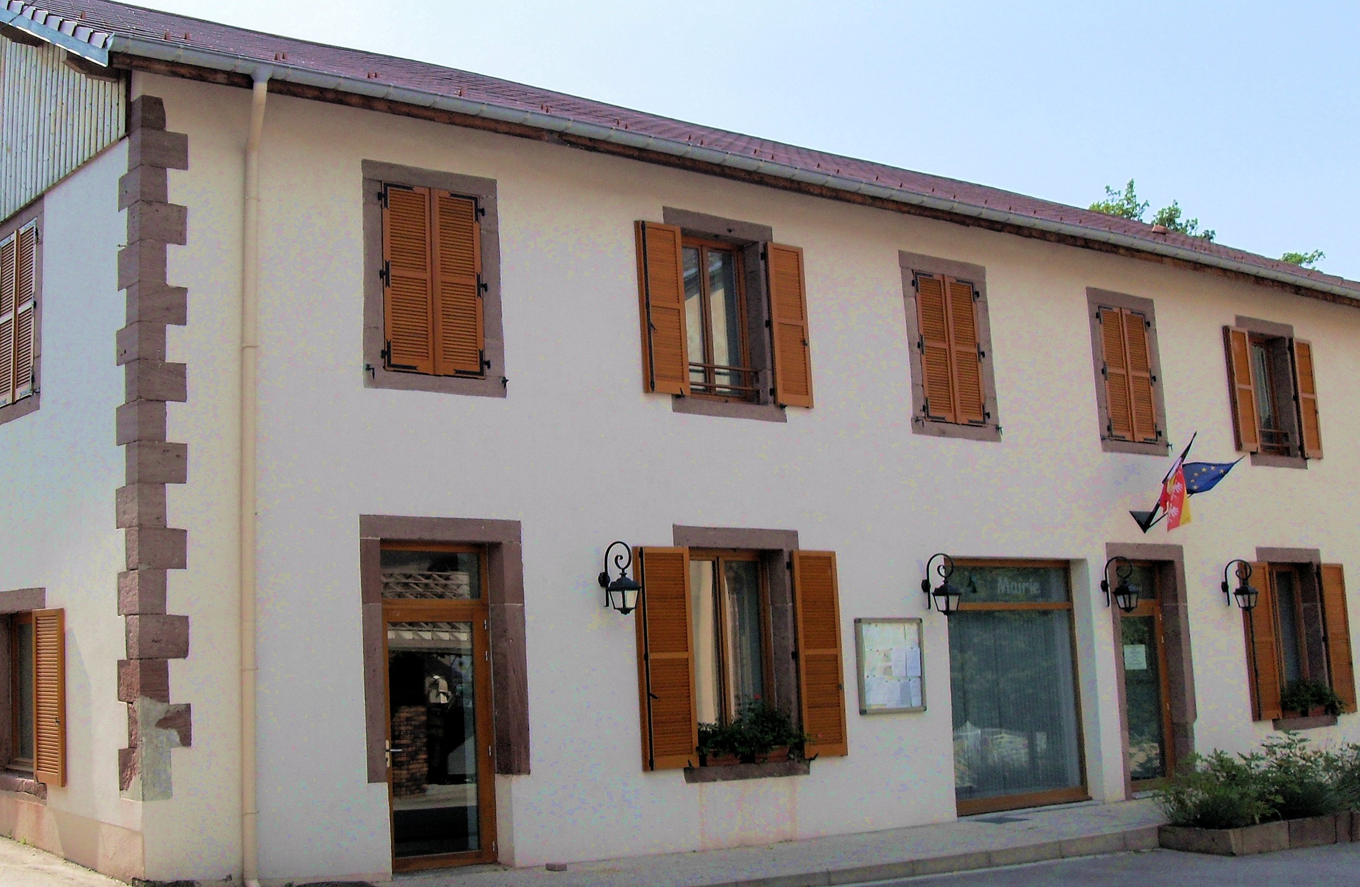 La mairie de Mortagne